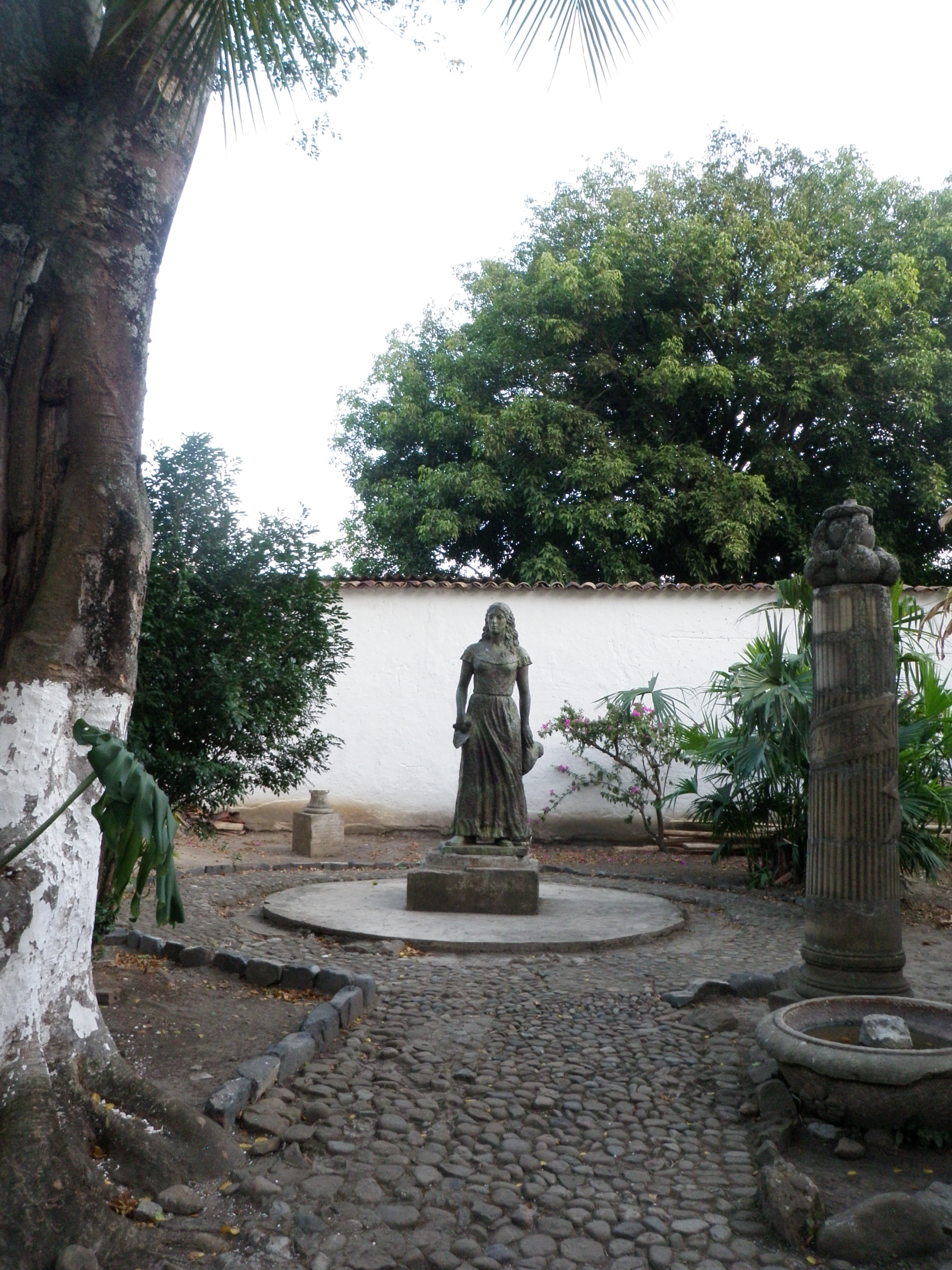 Sector Antiguo de la ciudad de Guaduas